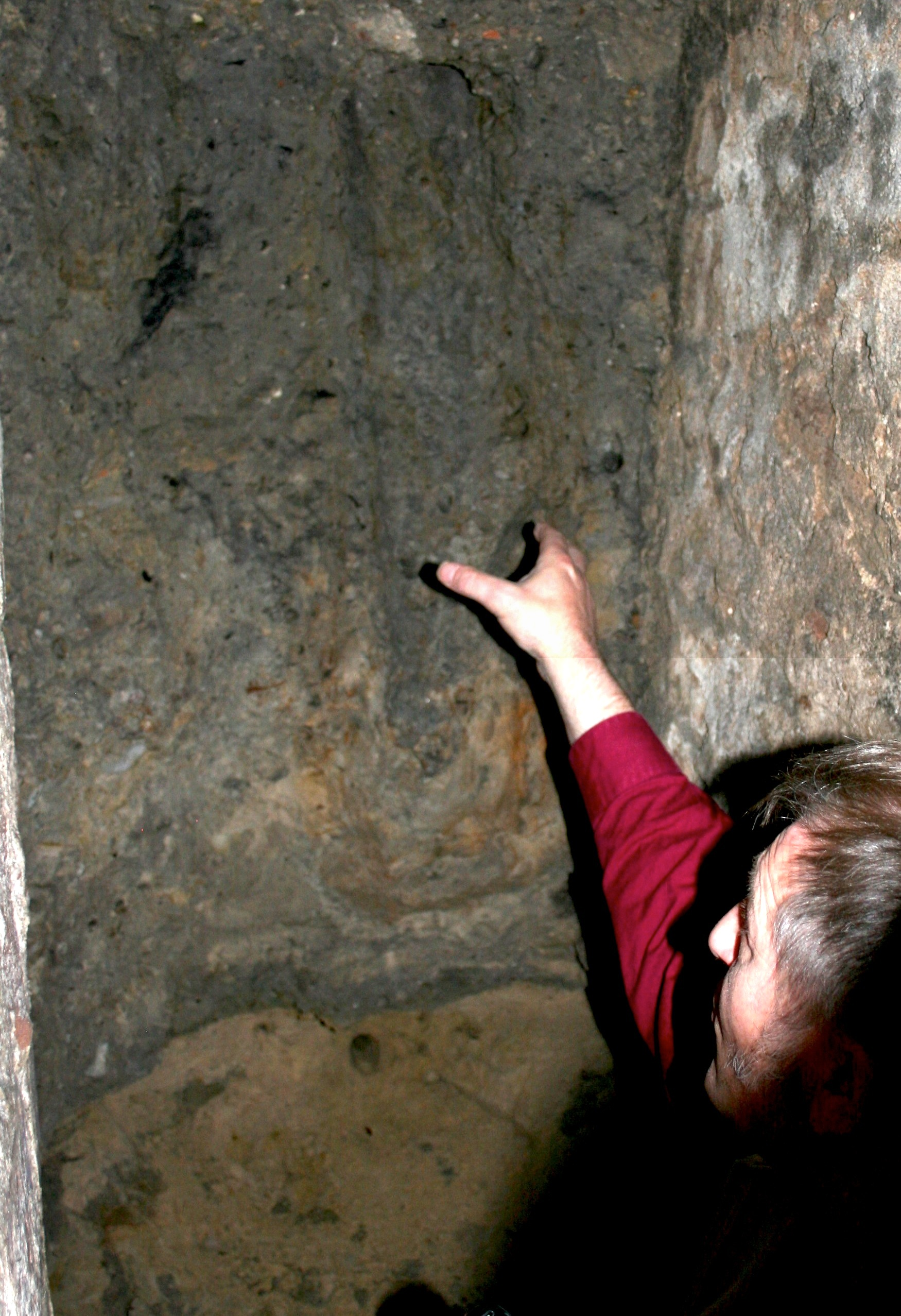 Un technicien de l’Œuvre Notre-Dame montre les pieux de fondation de la Cathédrale dans le sous-sol de la crypte